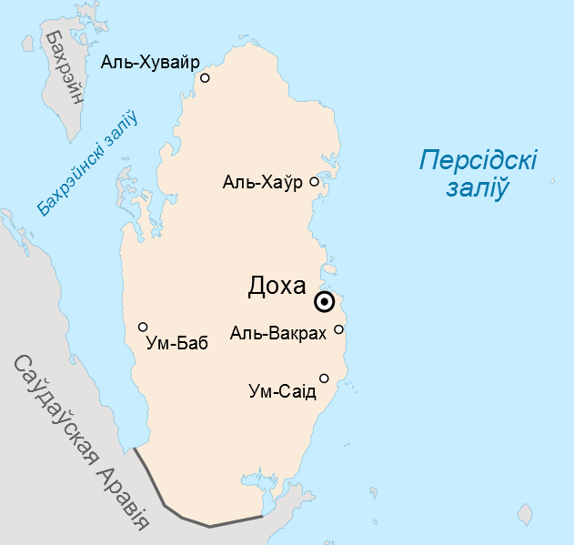 Карта Катара